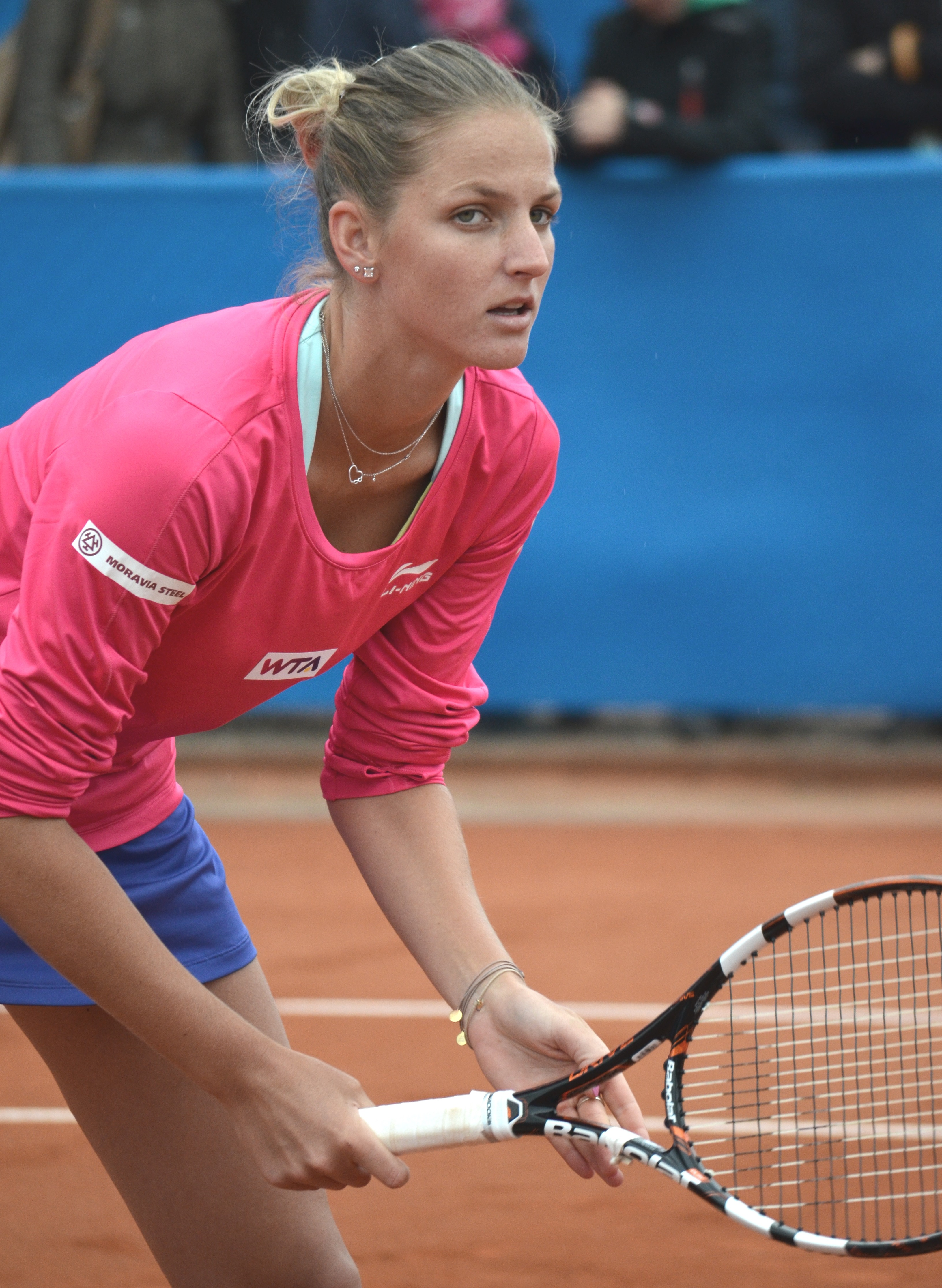 Karolina Pliskova in der Erstrundenbegegnung der Doppelkonkurrenz beim Nürnberger Versicherungscup 2014